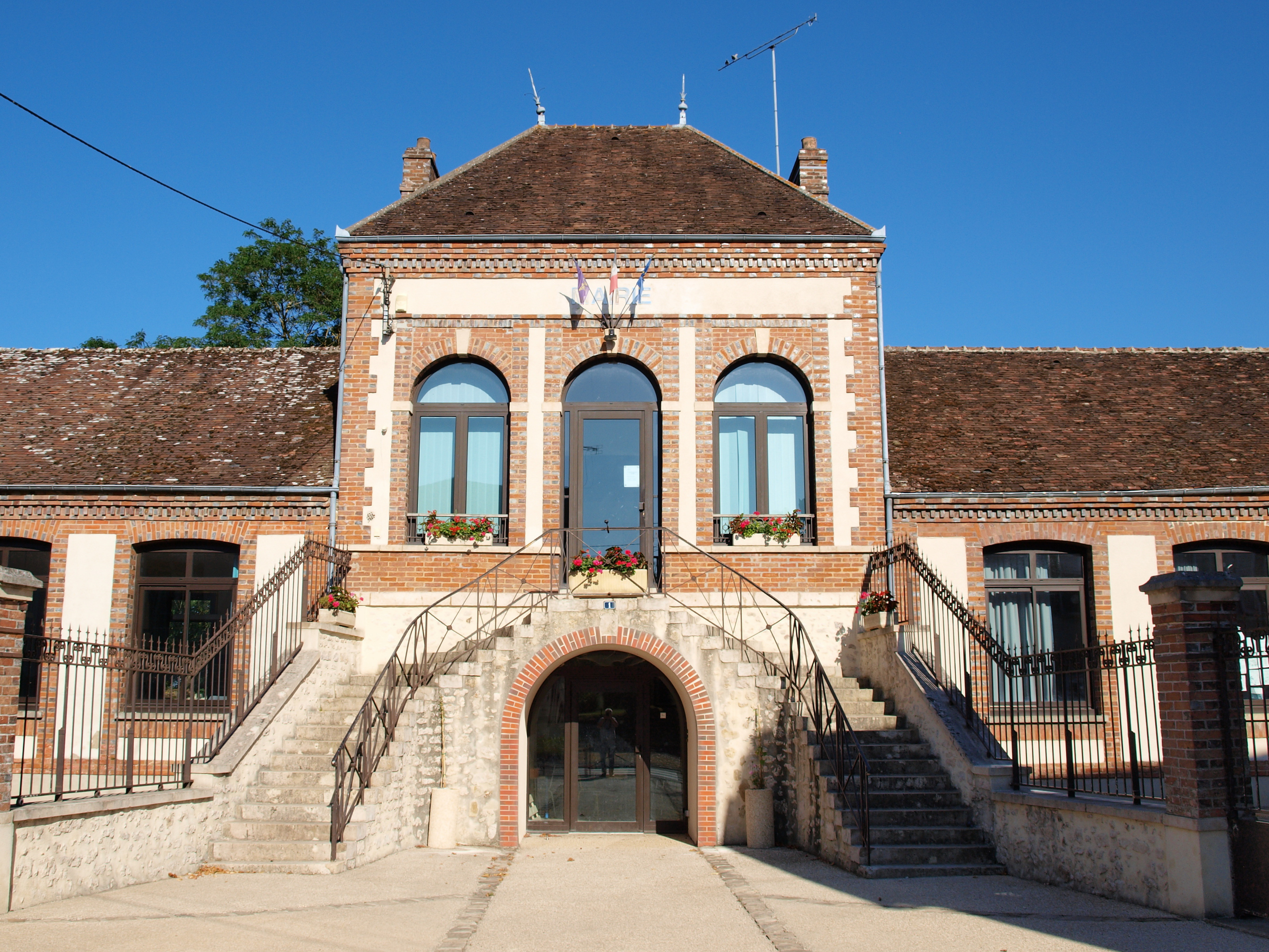 Mairie-école de Villebéon (Seine-et-Marne, France)